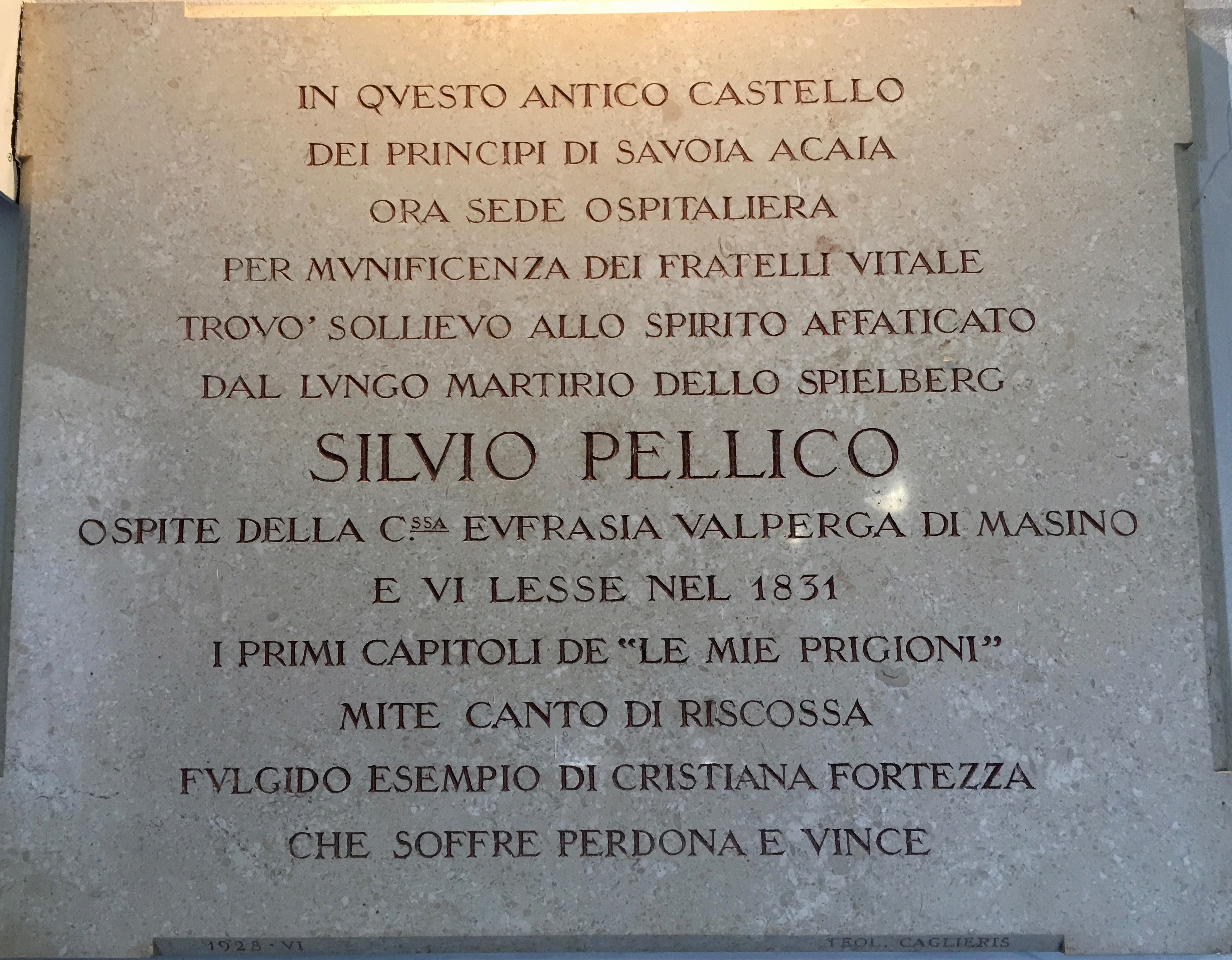 In memoria di Silvio Pellico